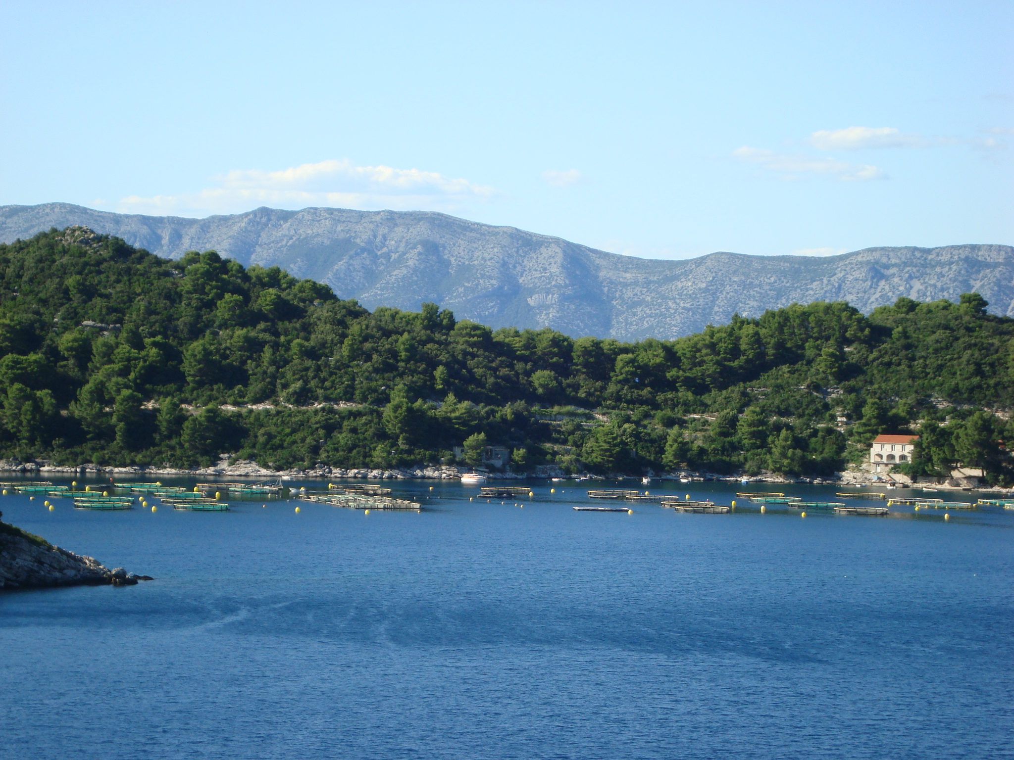 Ribogojilišta u Sobri na Mljetu, Hrvatska